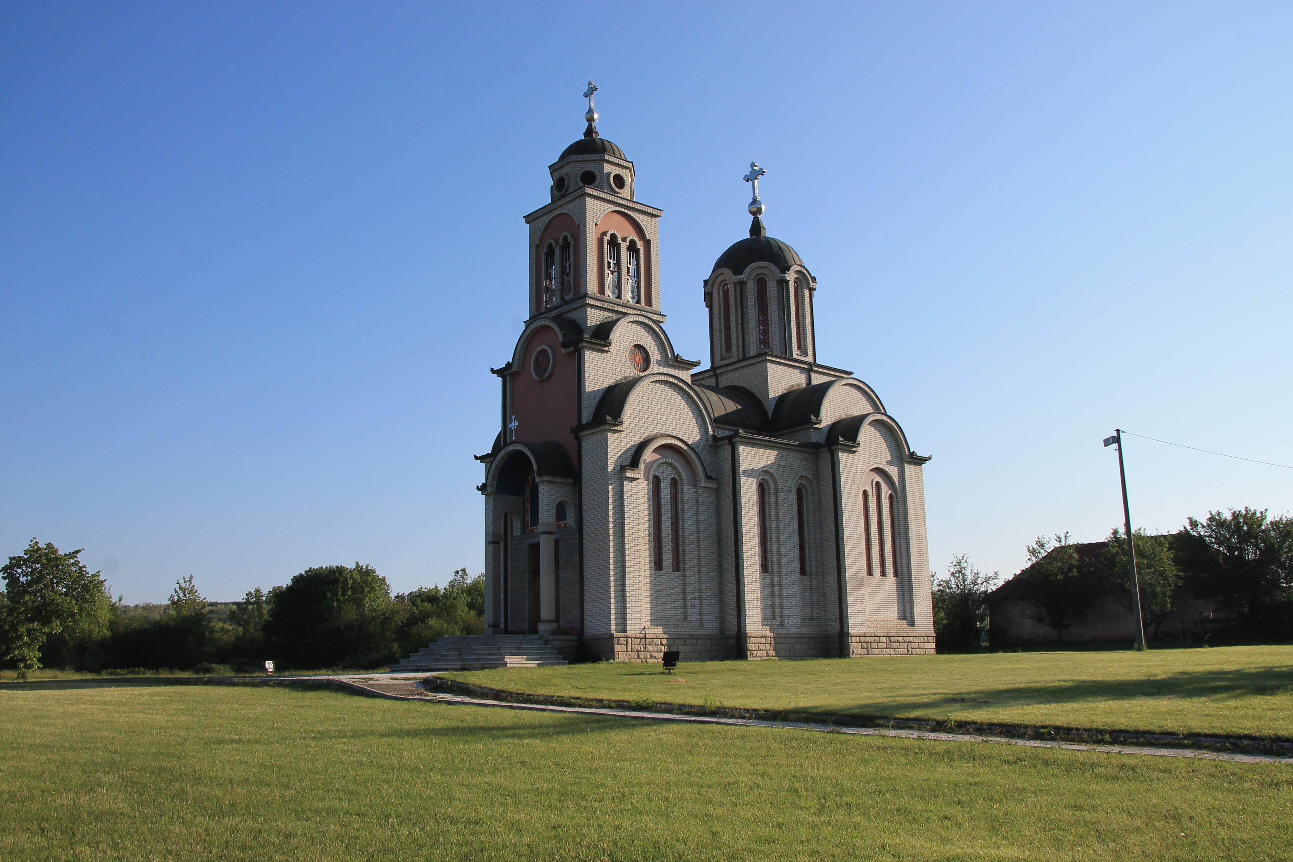 Crkva Sv. Simeona Monaha (Darosava)